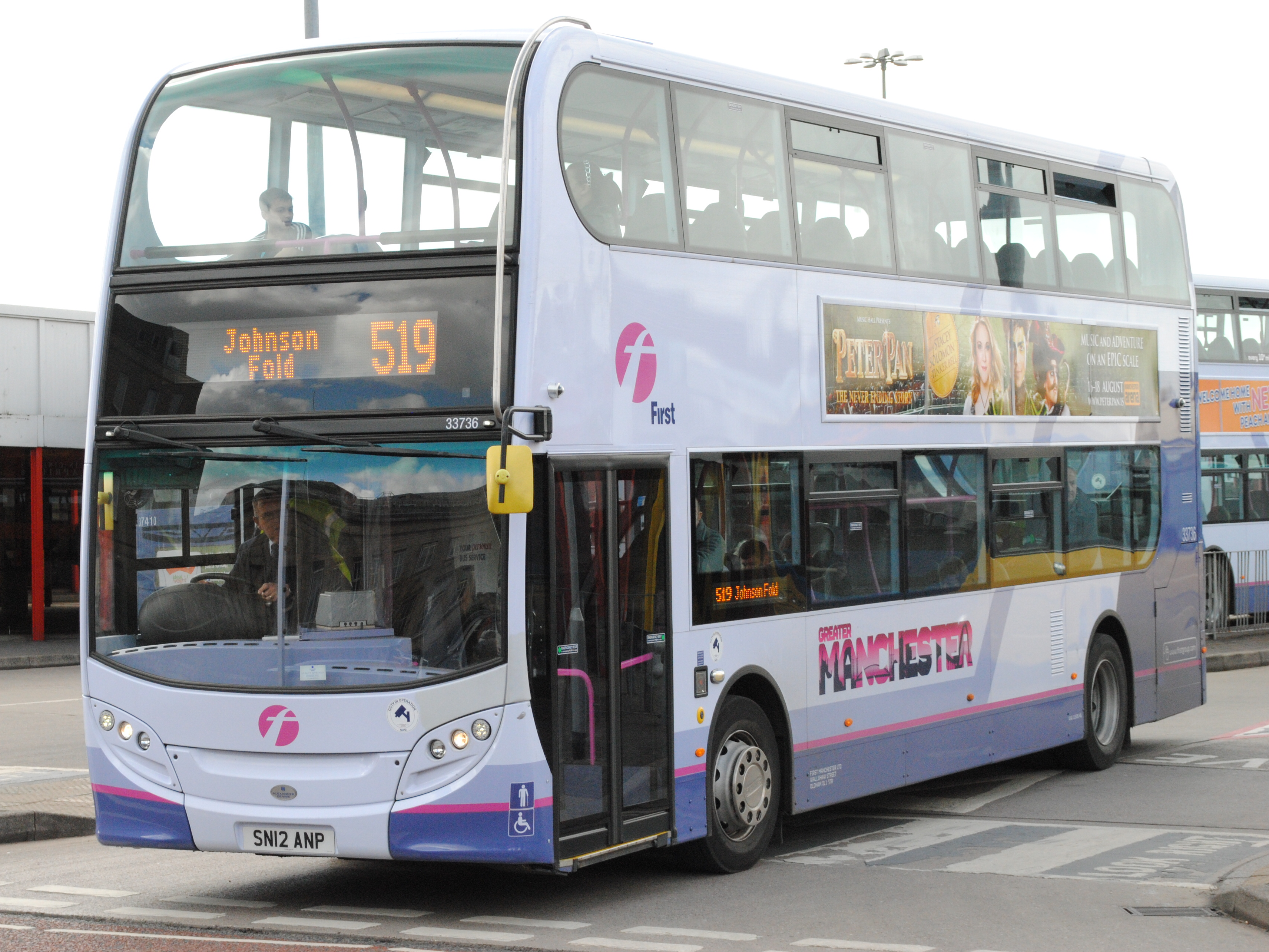 Alexander Dennis Enviro 400